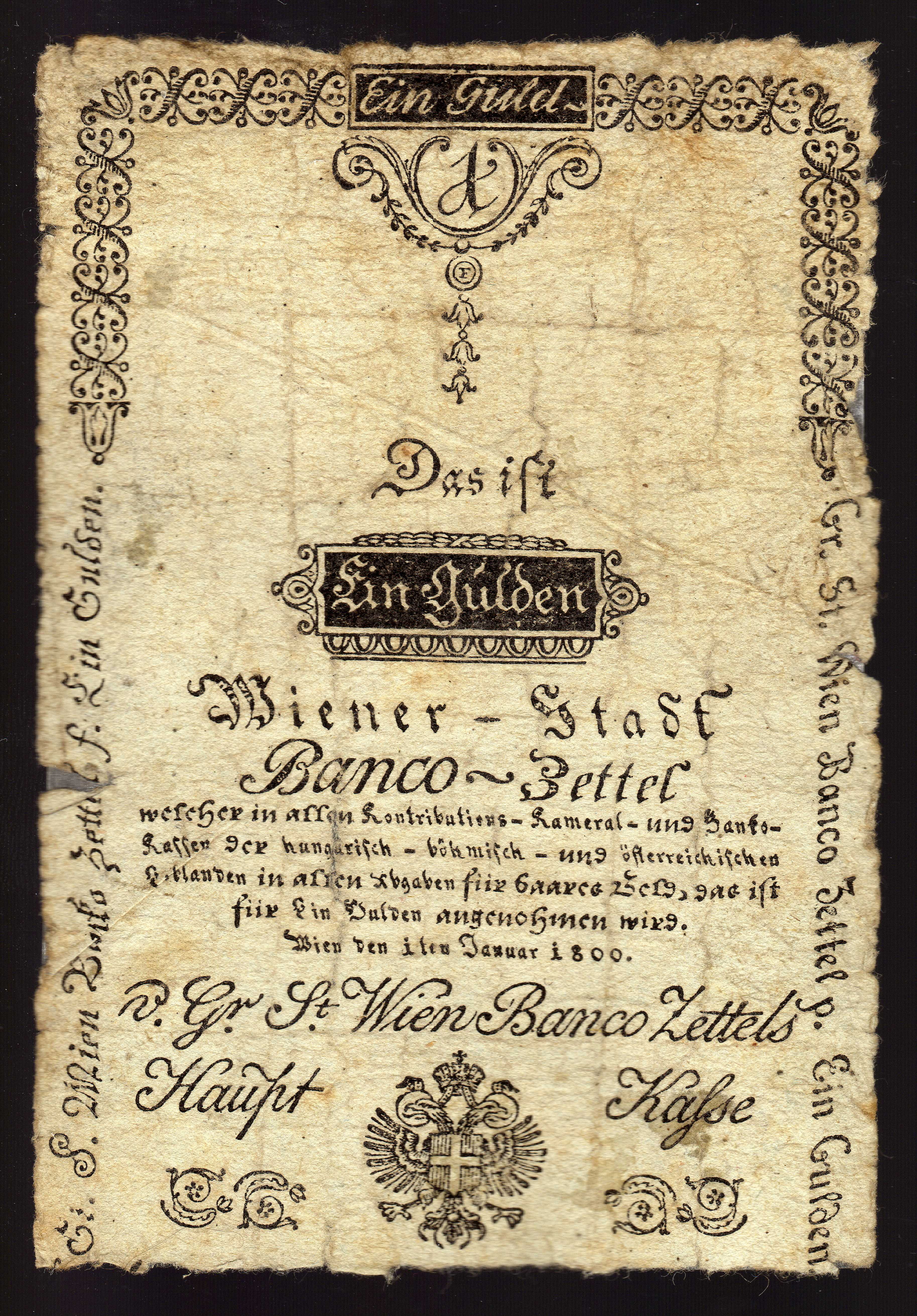 Bankovka v hodnotě 1 Gulden, první emise z 1. ledna 1800. Vydavatel: Vídeňská centrální banka.